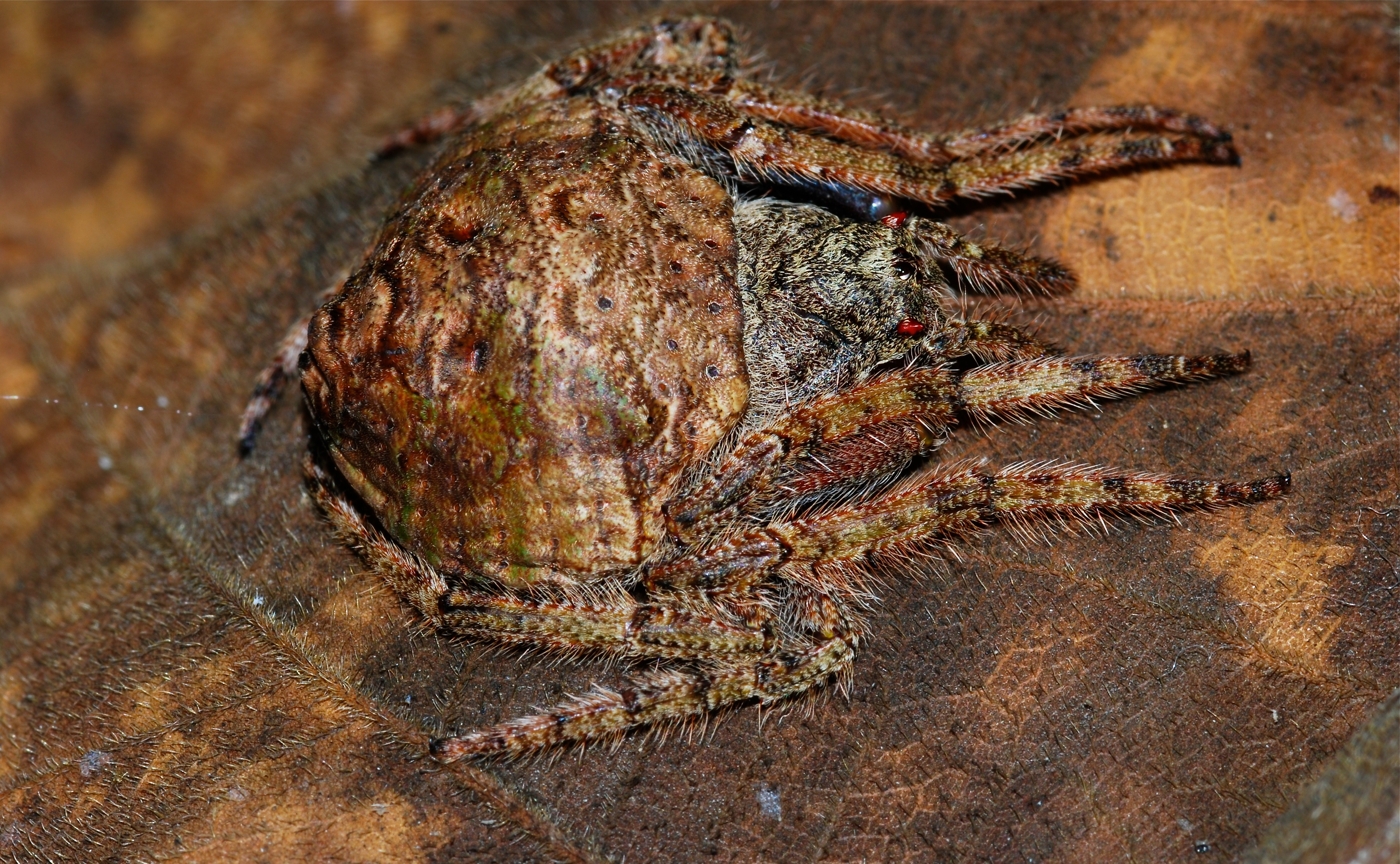 Taman Negara NP, Pahang, MALAYSIA